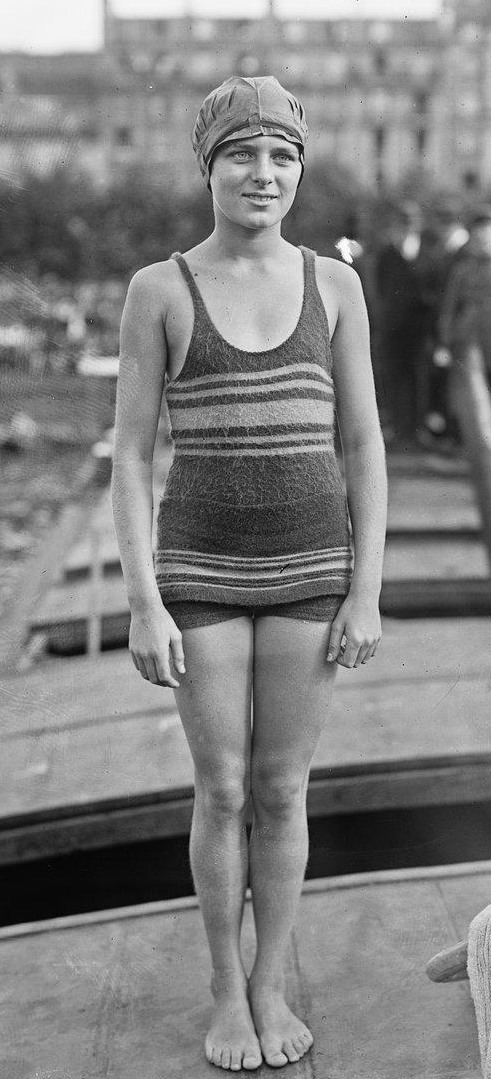 Miss Higgins [i. e. Aileen Riggin, Ile des Cygnes, Paris] : [photographie de presse] / [Agence Rol]